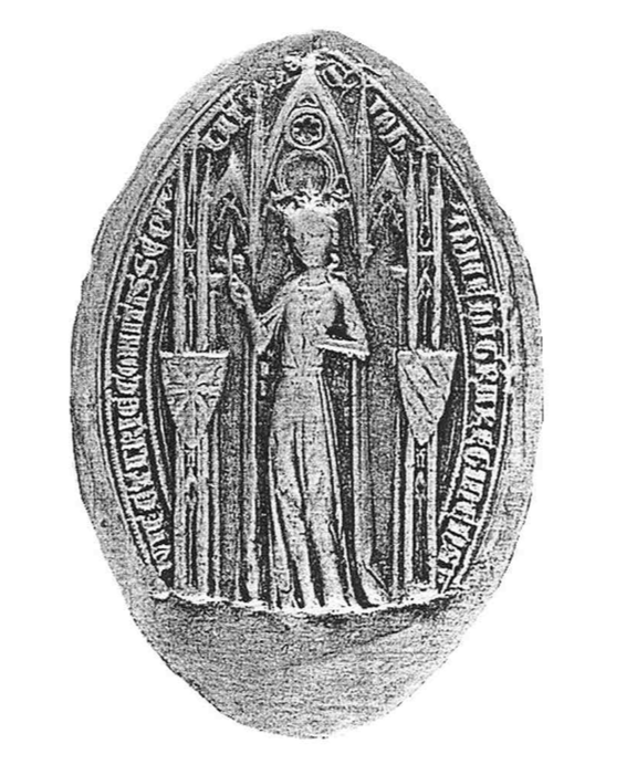 Seals of Joan I of Navarre